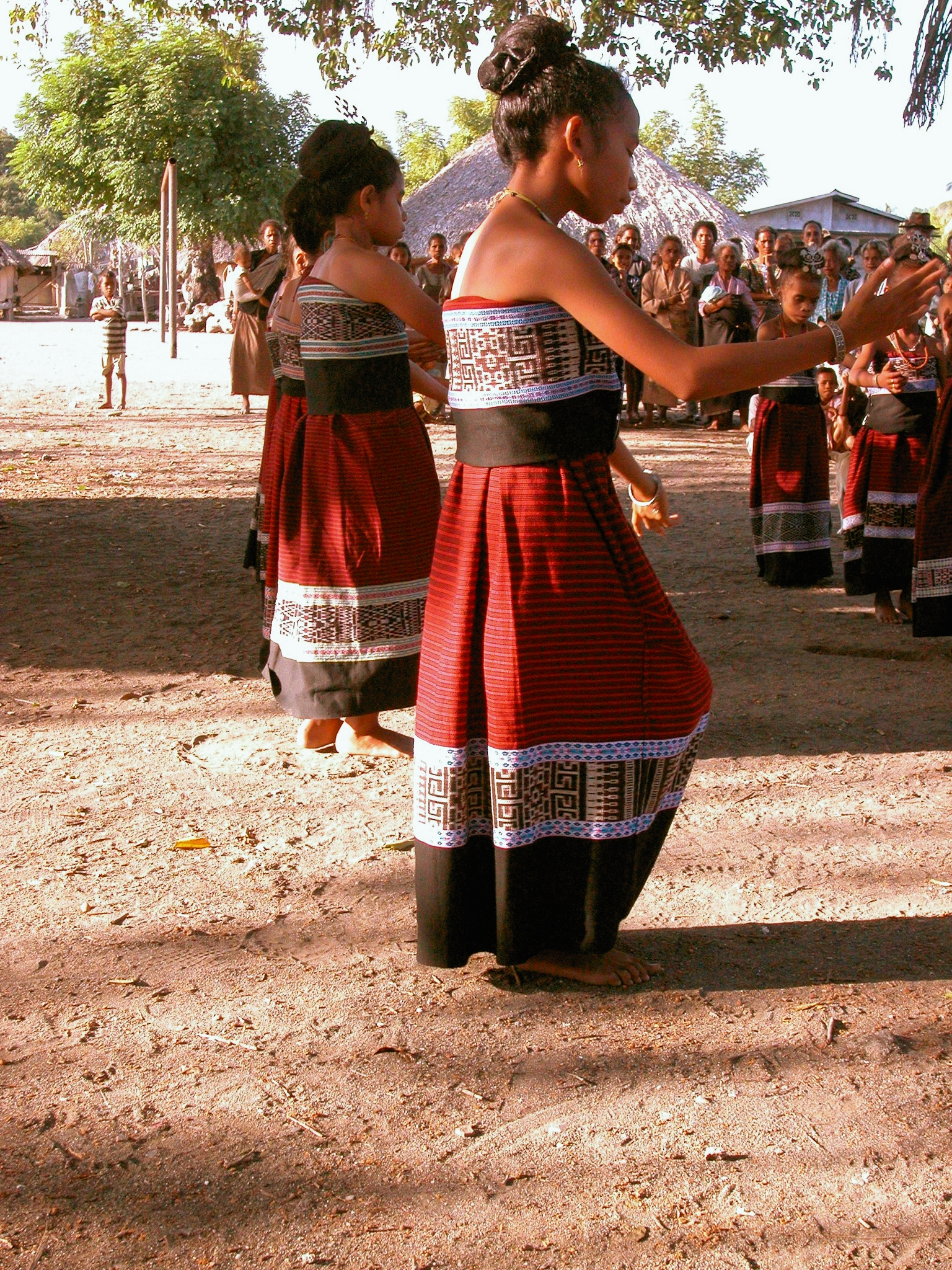 Fest in Suai